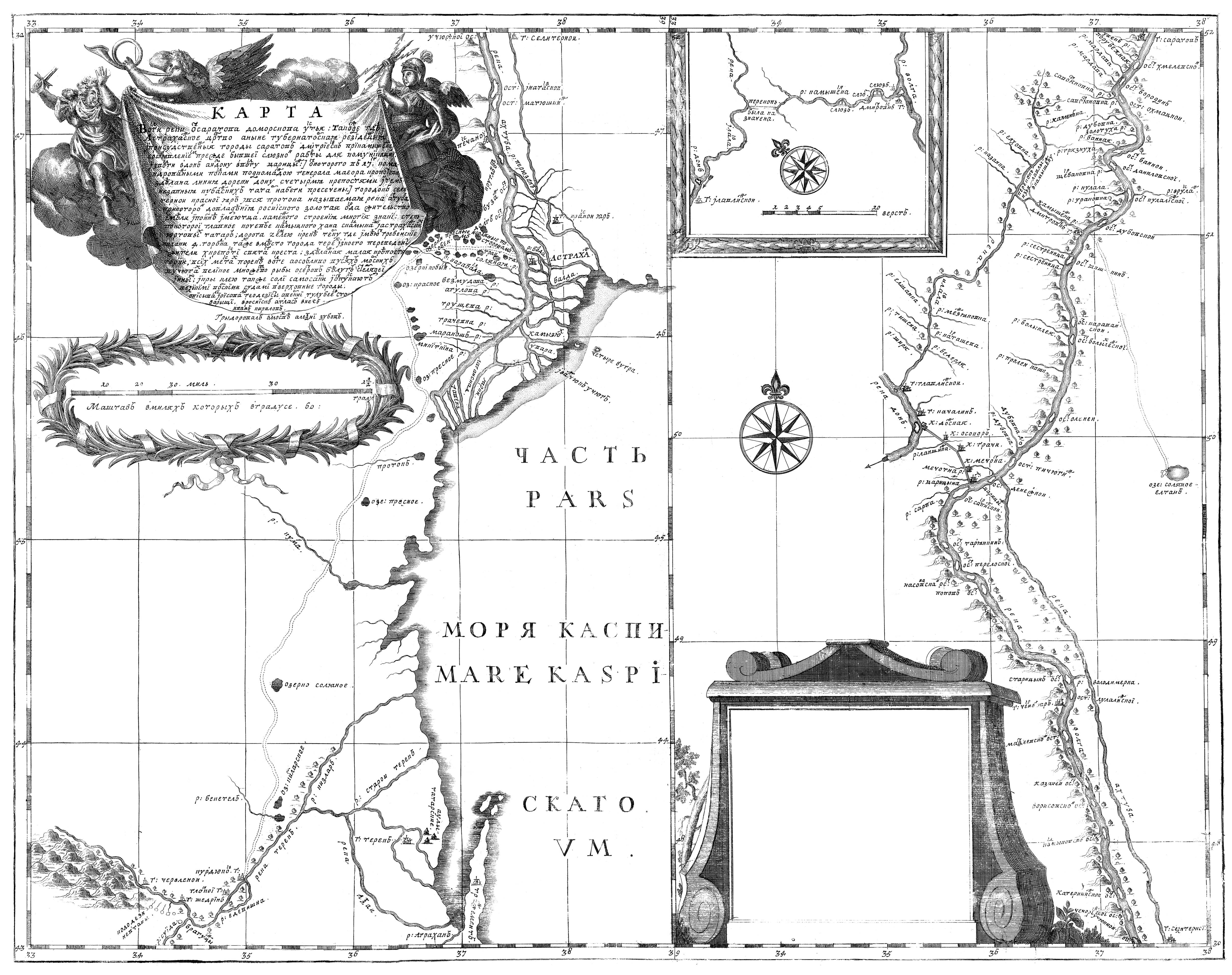 Карта Волги от Саратова до морского устья. «Атлас Всероссийской империи» И. К. Кириллова. 1722-1737 гг.